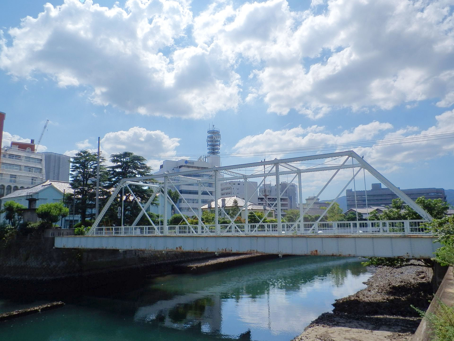 長崎市の出島橋(でじまばし) (Dejima bridge in Nagasaki Japan)